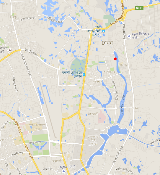 গুলশান আক্রমণের স্থান